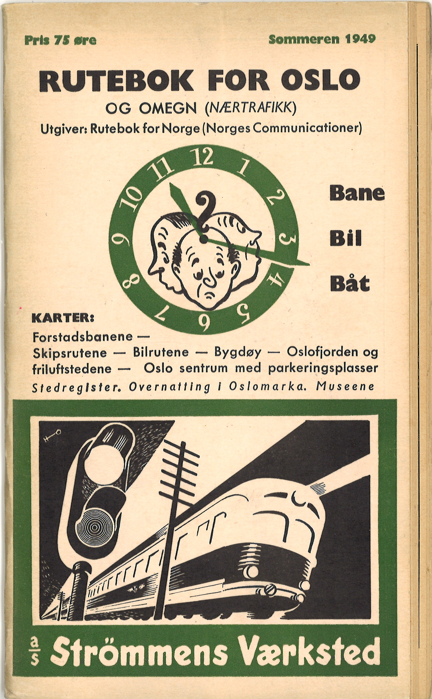 Framside av Rutebok for Oslo og omegn (nærtrafikk) utgitt av Rutebok for Norge.